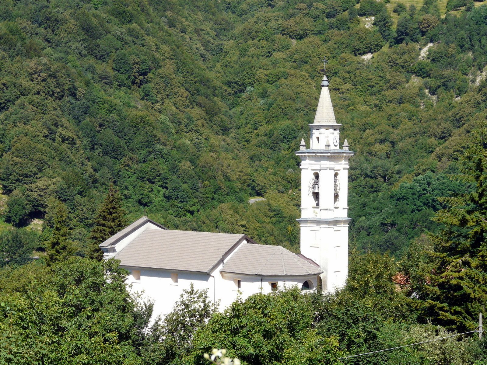 La chiesa di San Lorenzo, Propata, Liguria, Italia